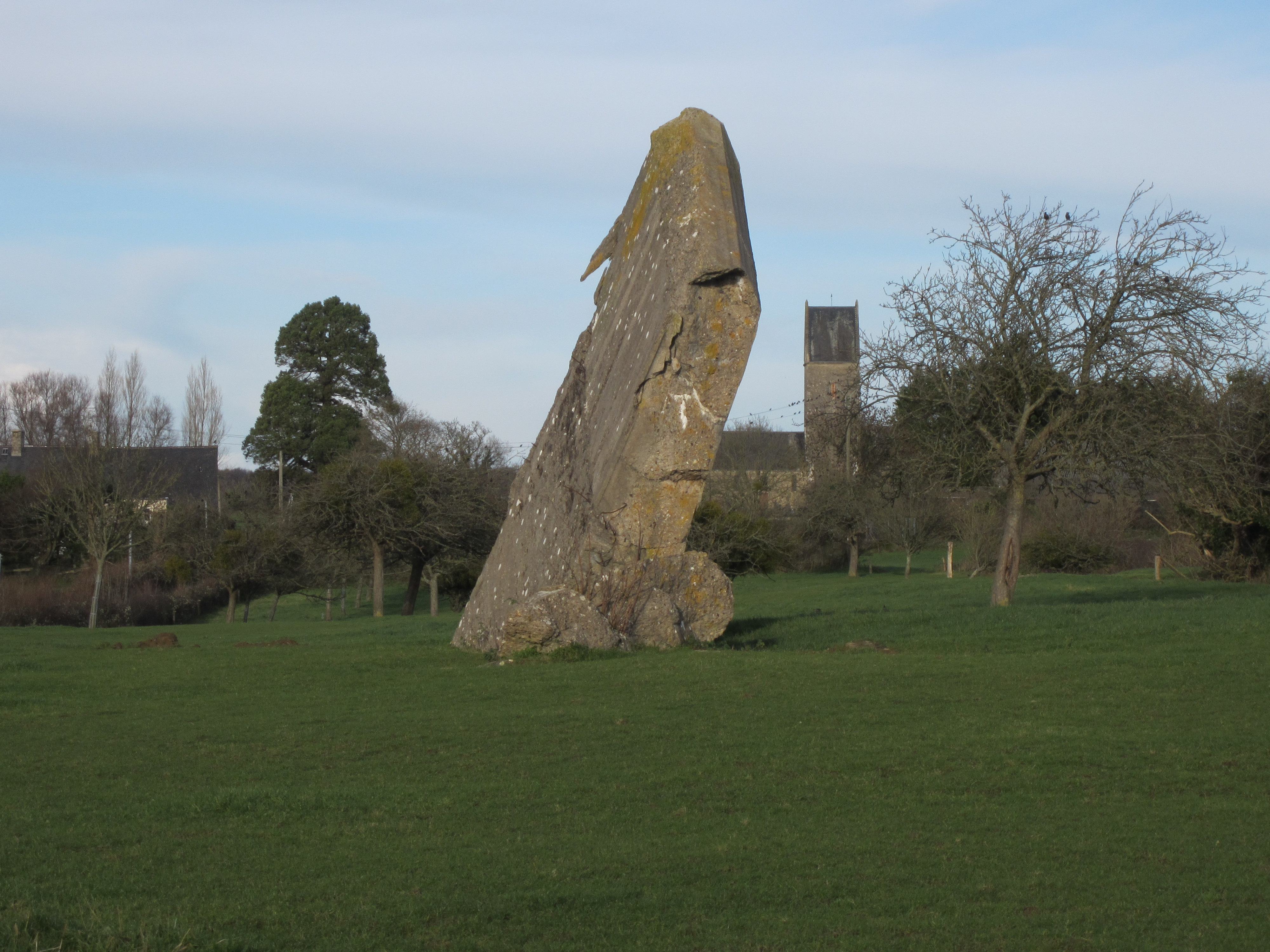 Ozeville, Manche Il fut retourné par les bombardement